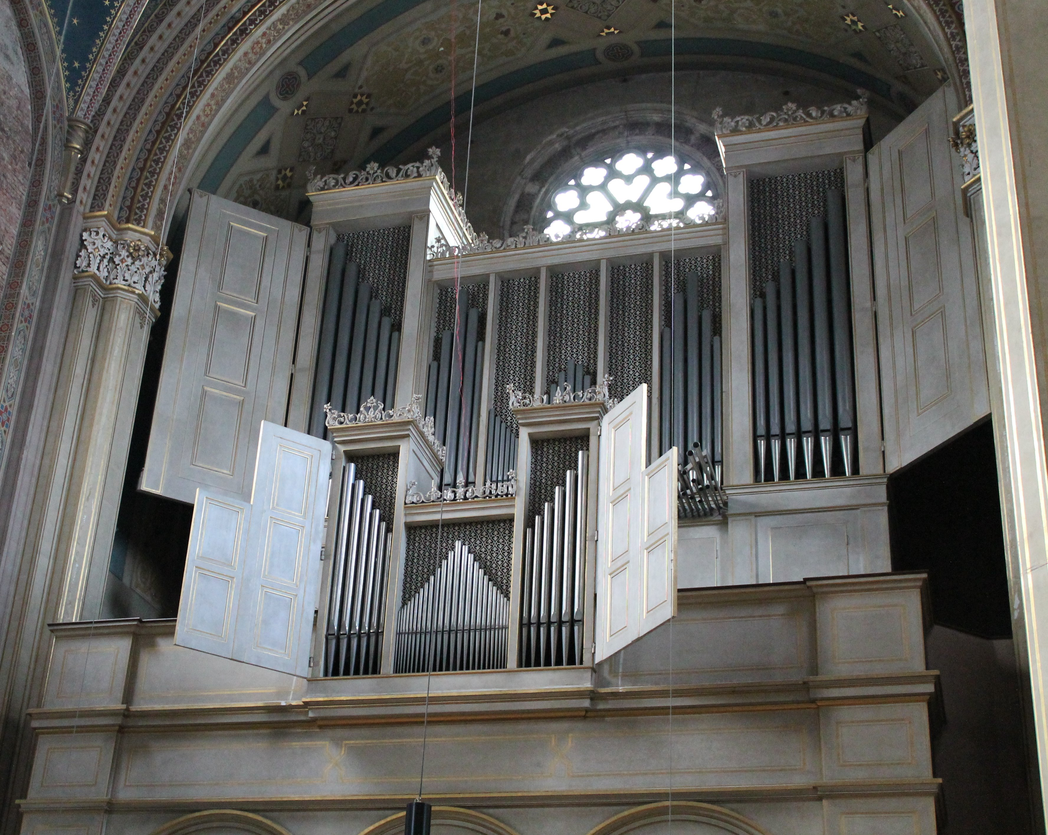 Orgel der Ludwigskirche in München